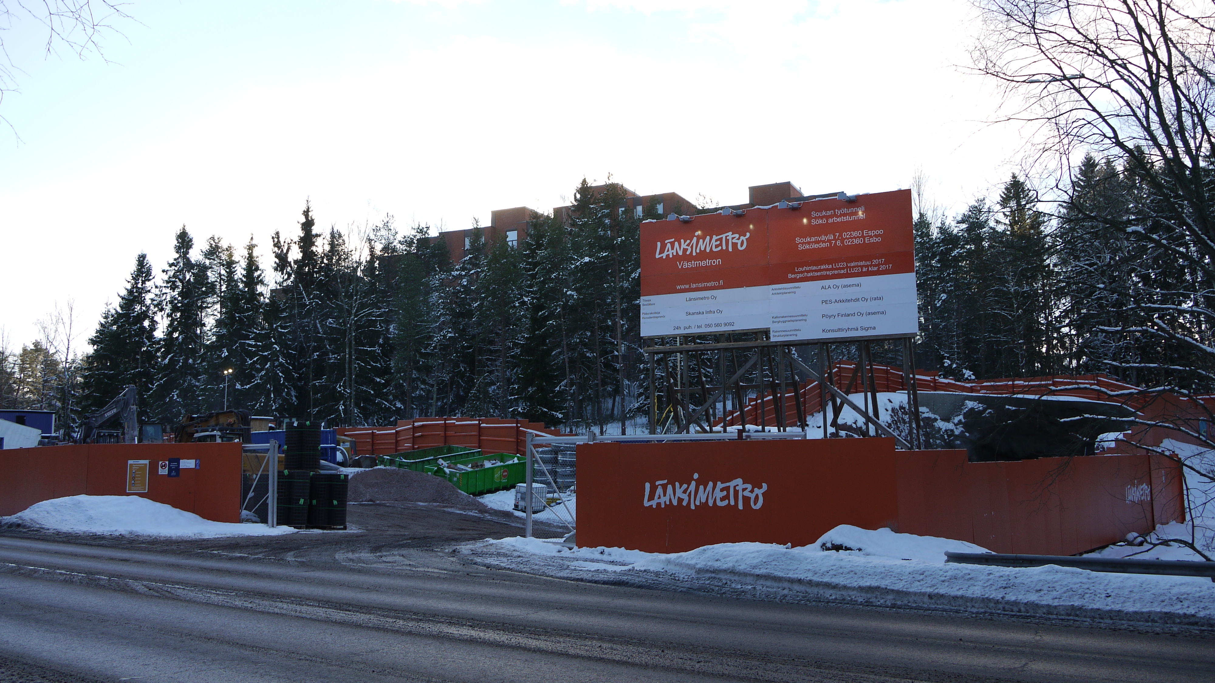 Soukan metroaseman työtunneli